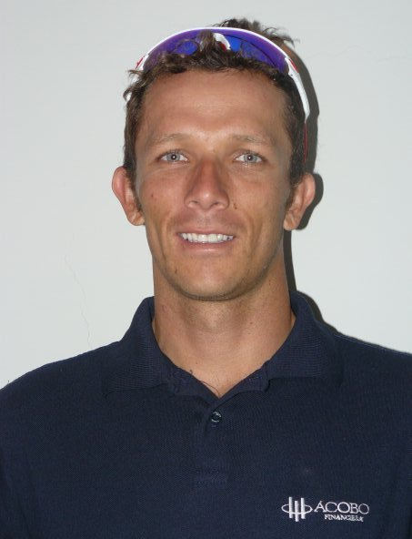 Leonardo Chacon